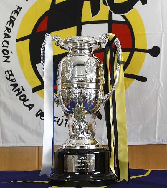 Copa Federación (España).